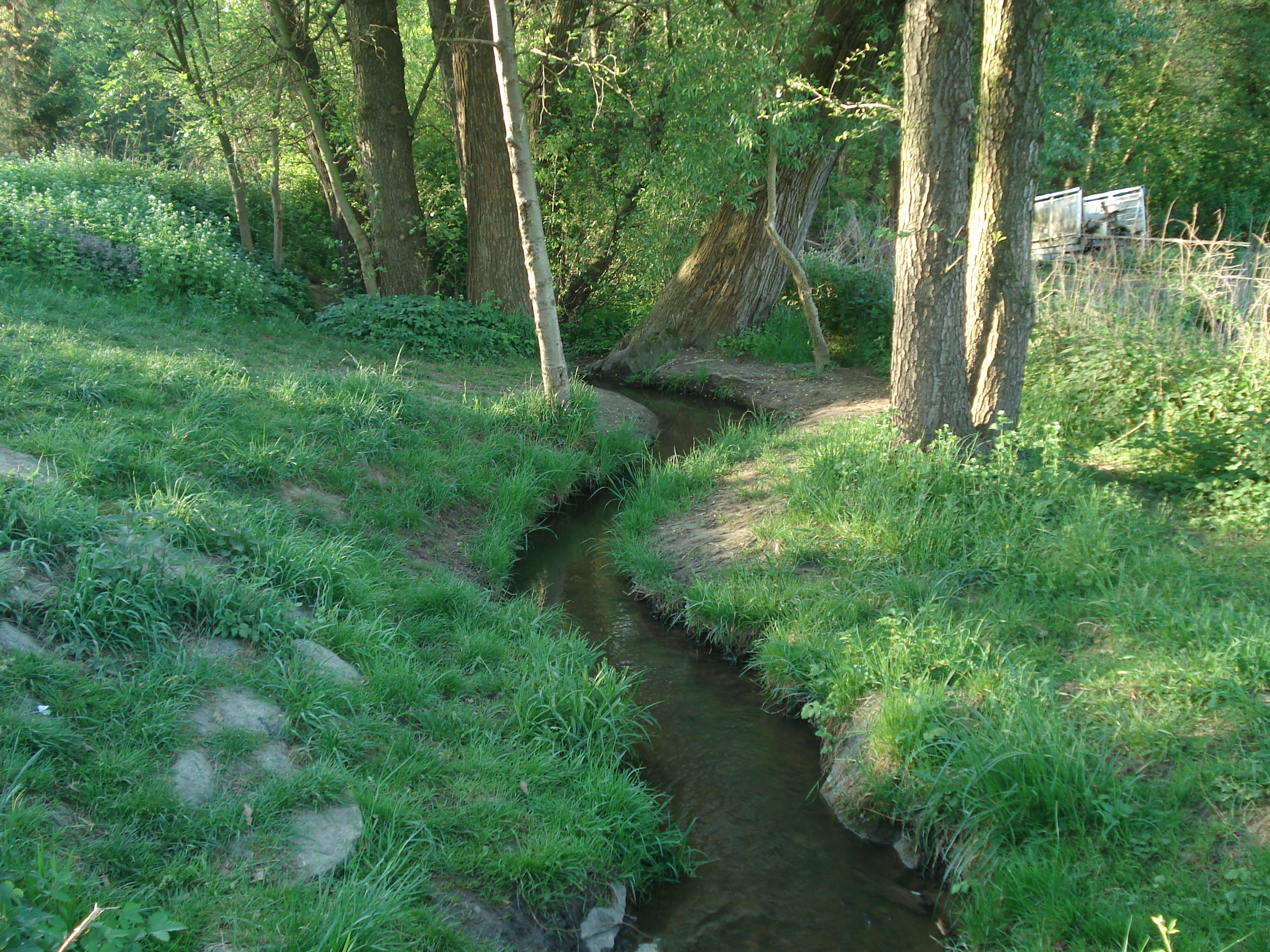 Der Lohmgraben in Aschaffenburg-Damm